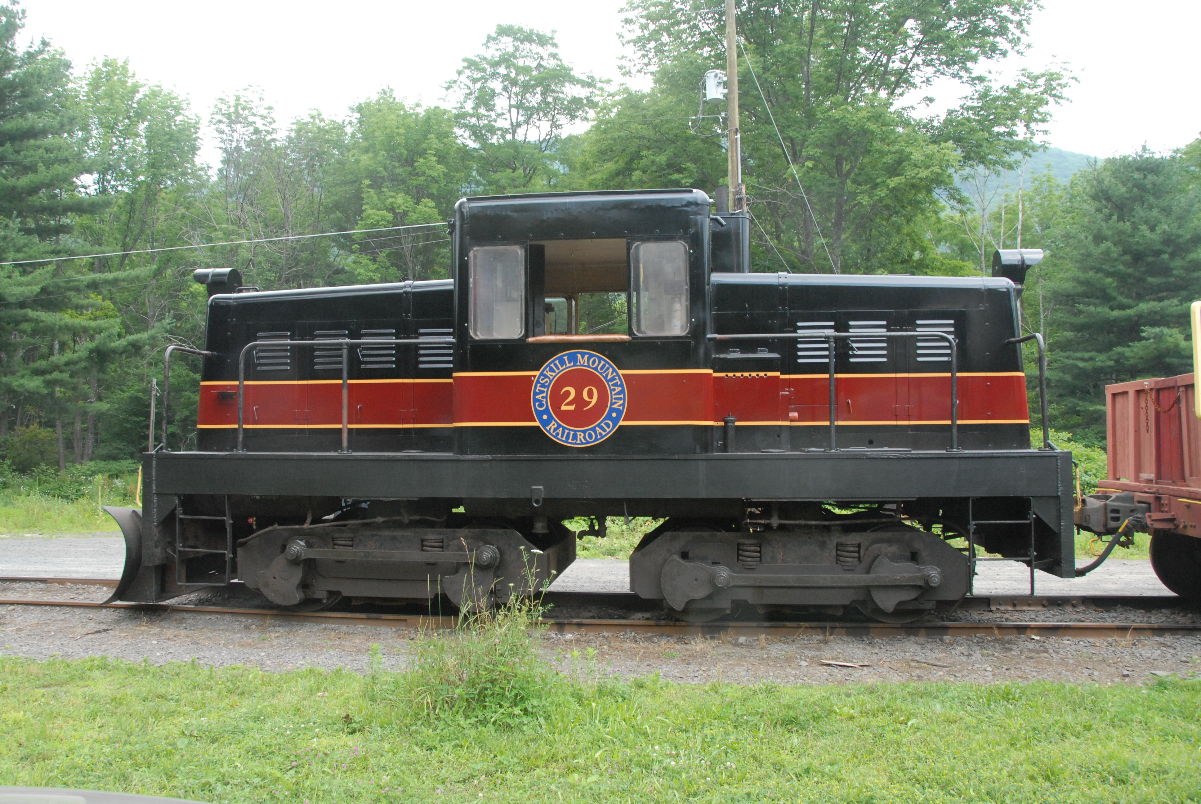 CMRR Locomotive